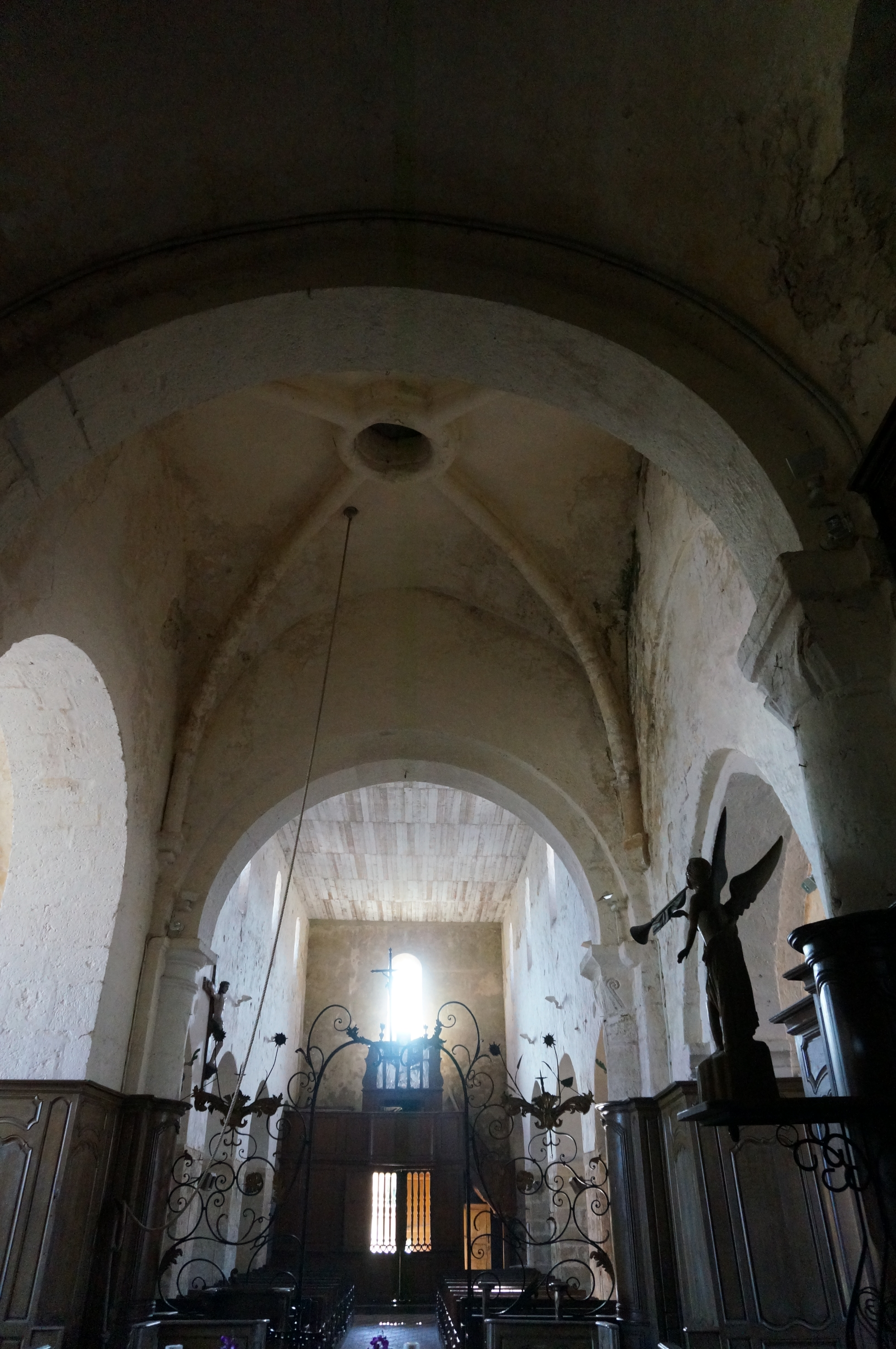 en l'Église Saint-Alpin de Villevenard.